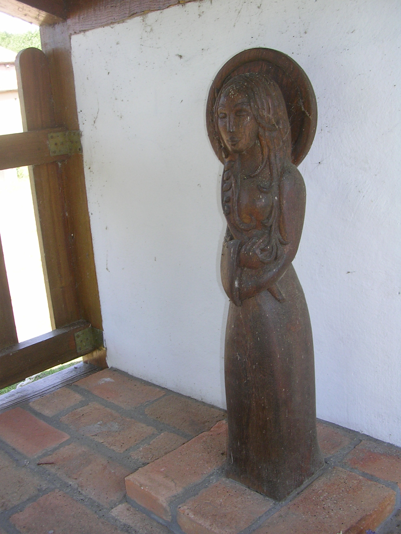 Statue de Sainte-Ruffine, patronne de la source dite "miraculeuse" du même nom, à proximité immédiate de l'église Sainte Ruffine d'Aureilhan, dans le département français des Landes